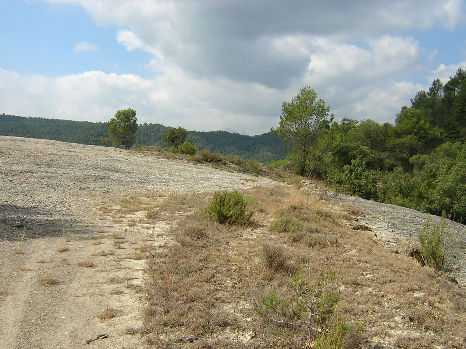 El Coll de Sant Llogari (Castellcir, Castellterçol i Monistrol de Calders, Moianès)